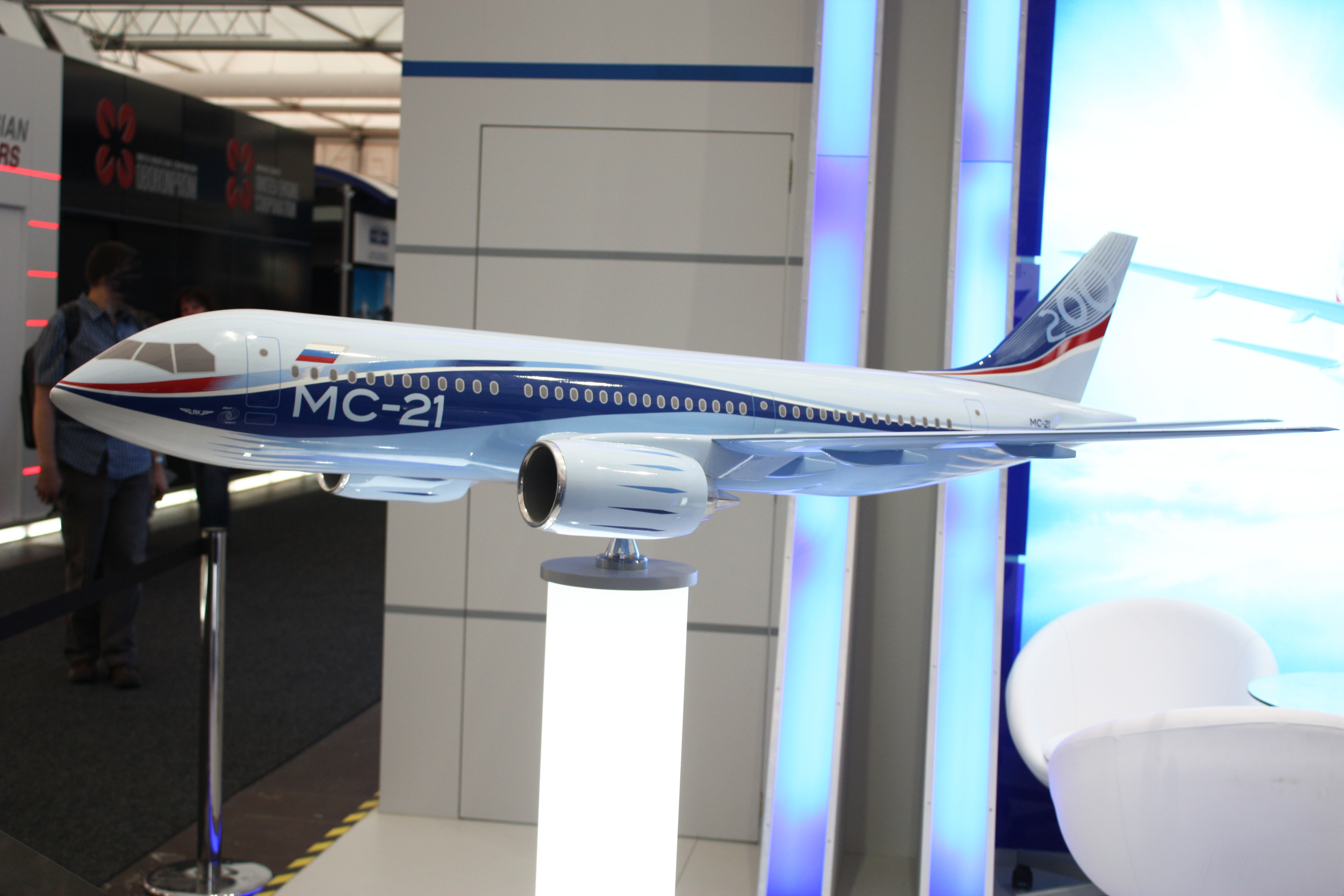 ILA 2010, am Samstag aufgenommen, meist erhöht von einer Leiter fotografiert